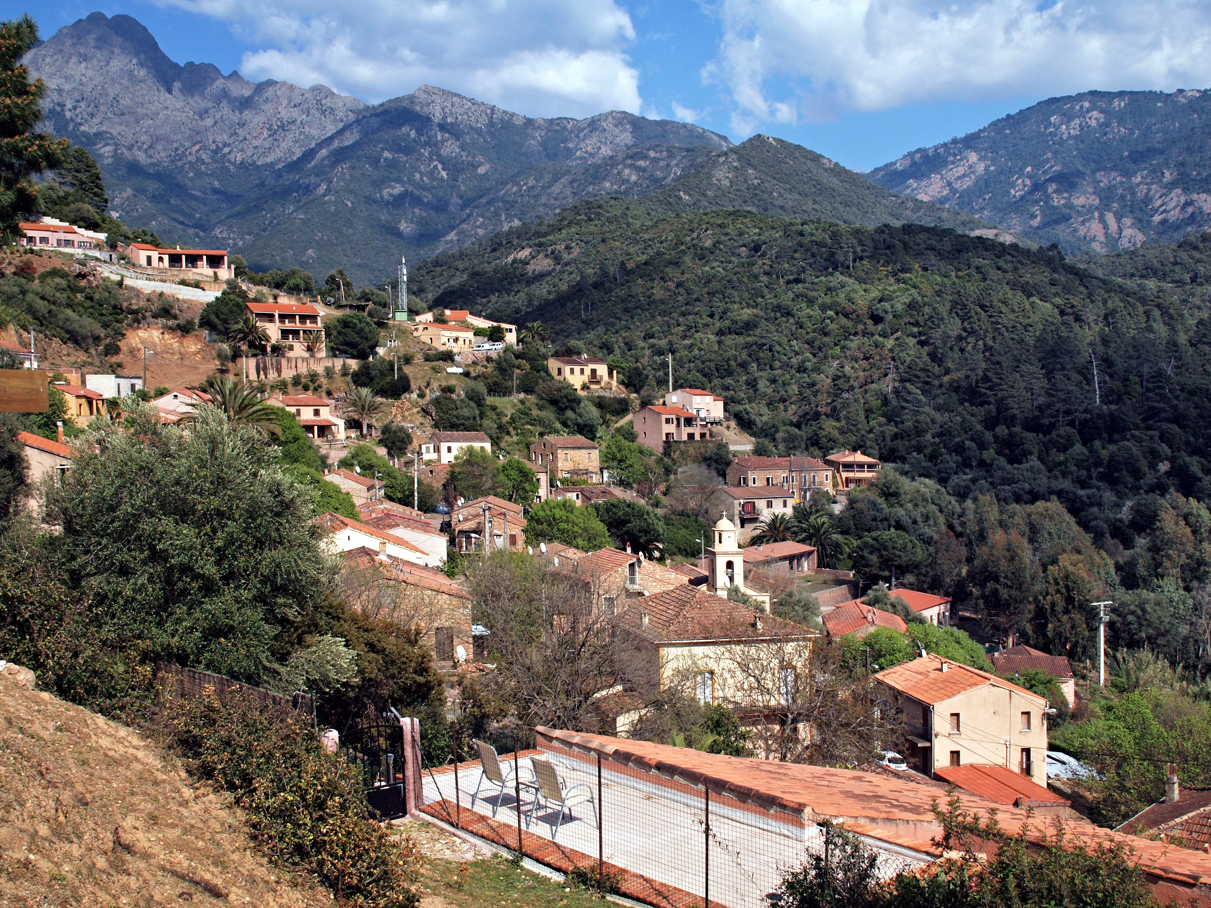 Serriera (Corse) - Vue du village